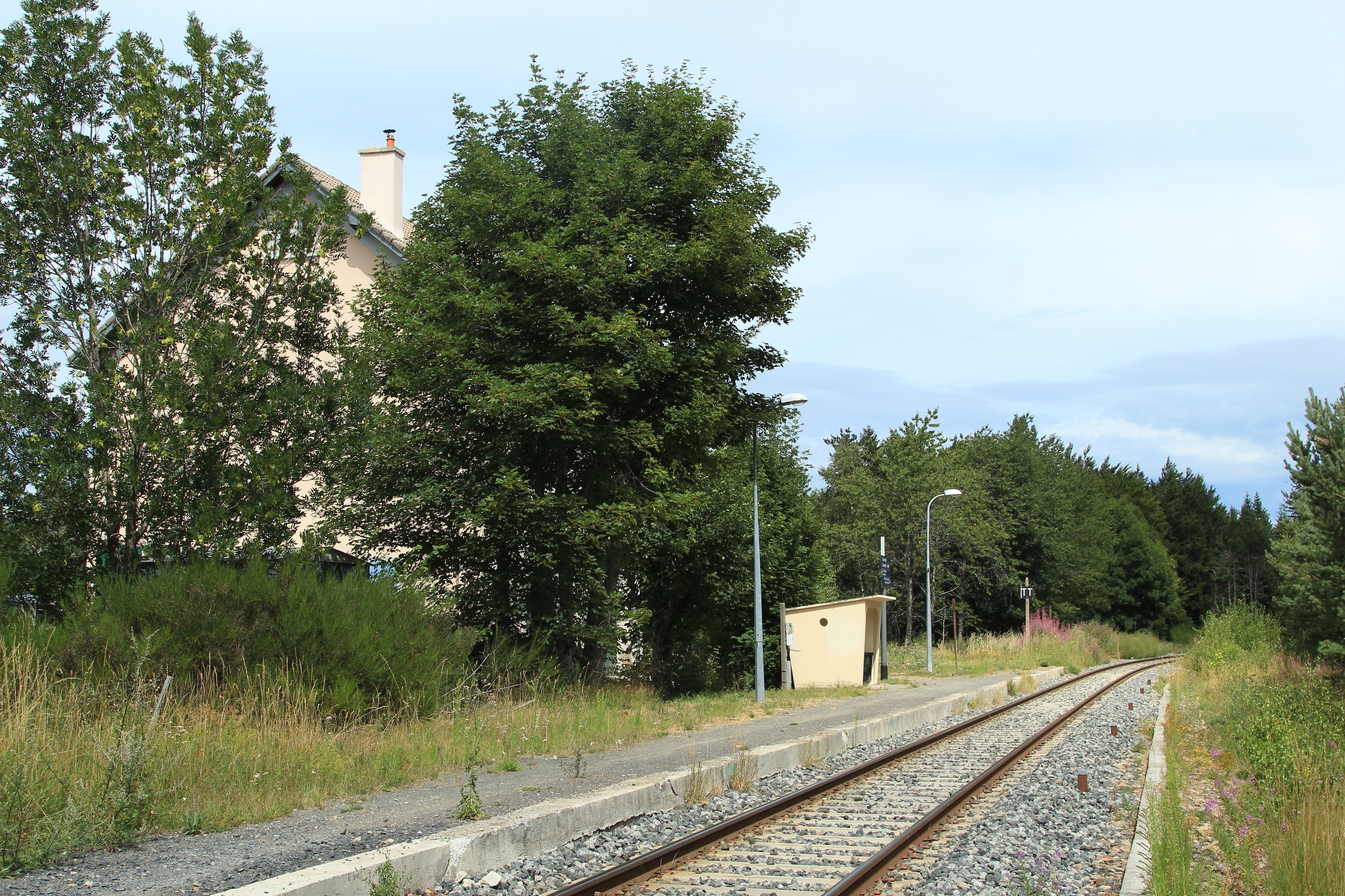 Vue générale de la gare de Chasseradès, en direction de La Bastide.